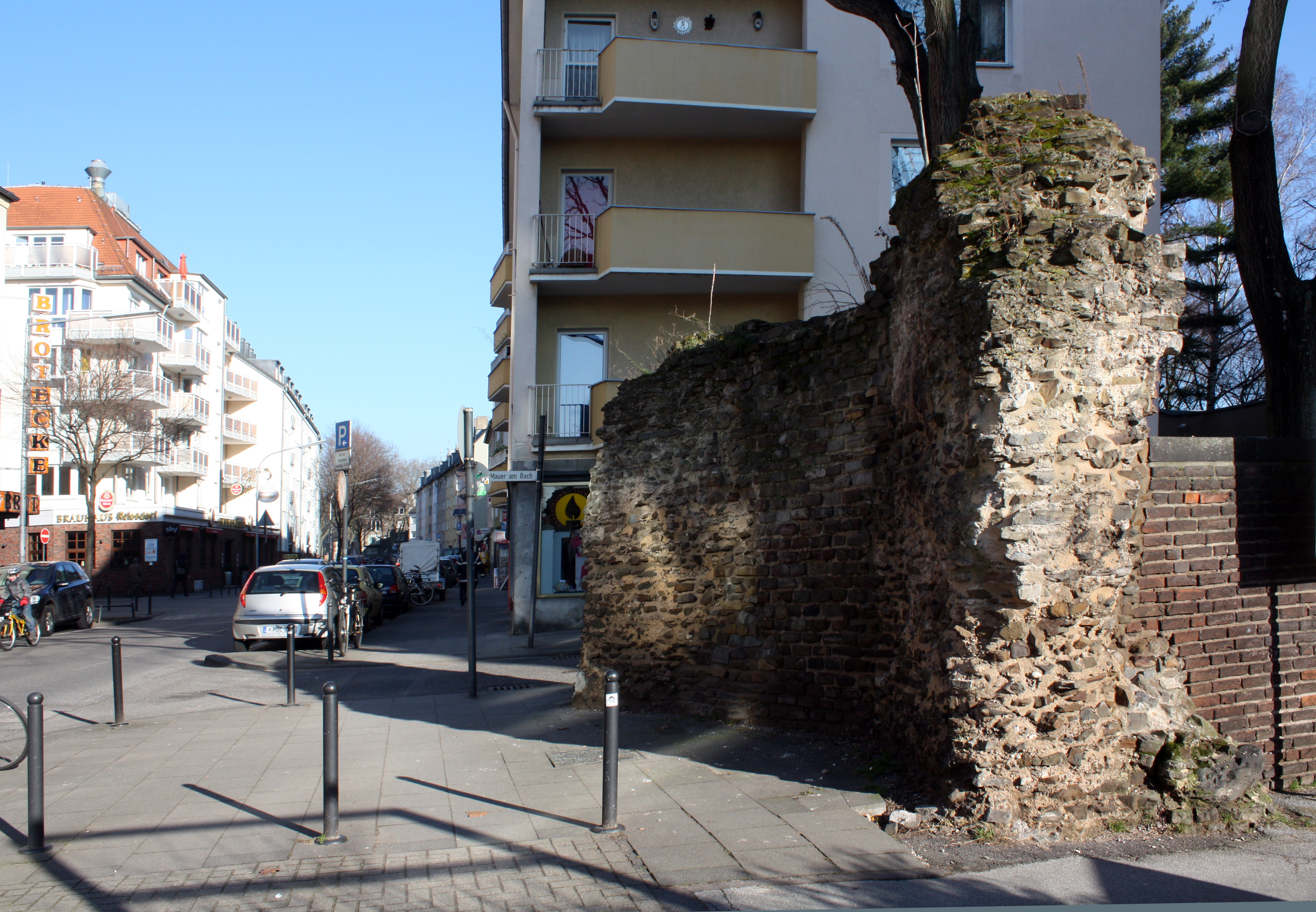 Kölner Stadtmauerrest, Kleiner Griechenmarkt / Alte Mauer am Bach This is a photograph of an architectural monument.